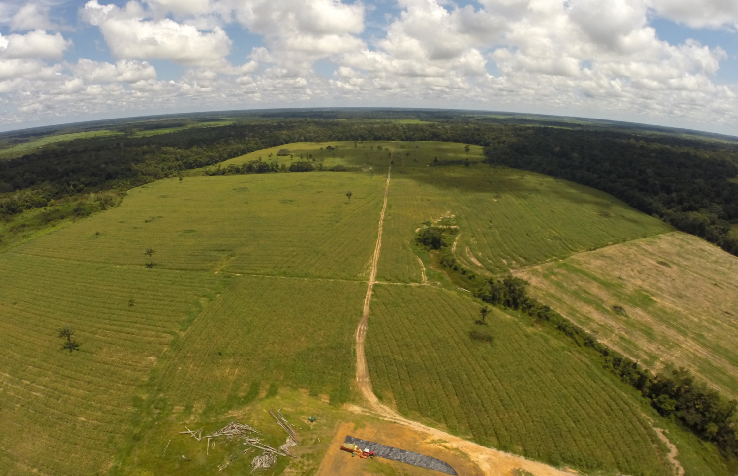 Fotos: Sérgio Vale/Secom e Pedro Devani/Secom (aéreas)